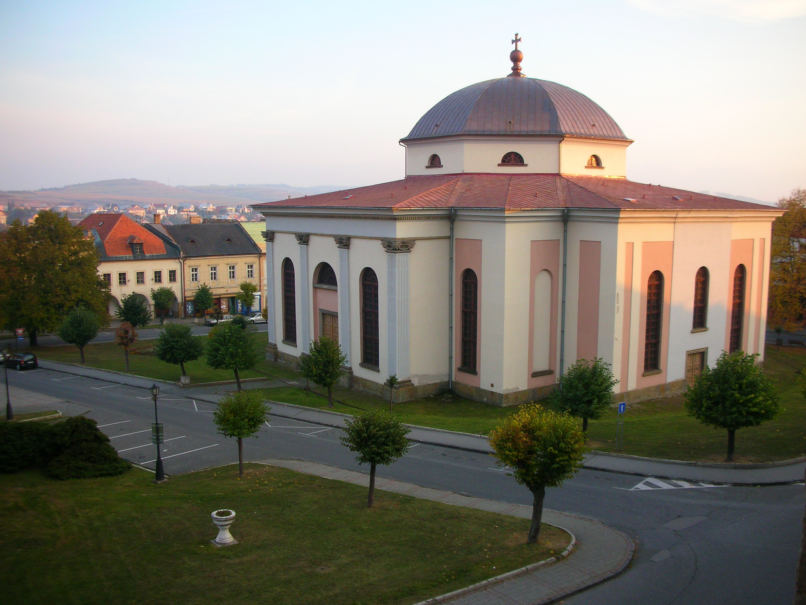 Levoča - evanjelický kostol